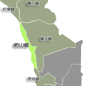 屏東縣枋山鄉相對位置。